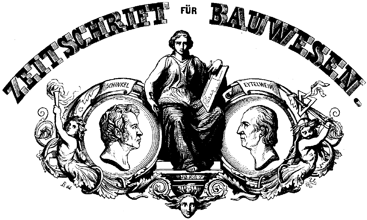 Titelkopf der Zeitschrift für Bauwesen